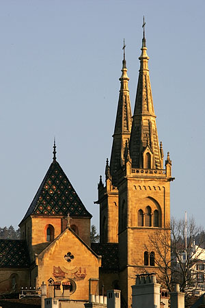 Stiftskirche à Neuchâtel